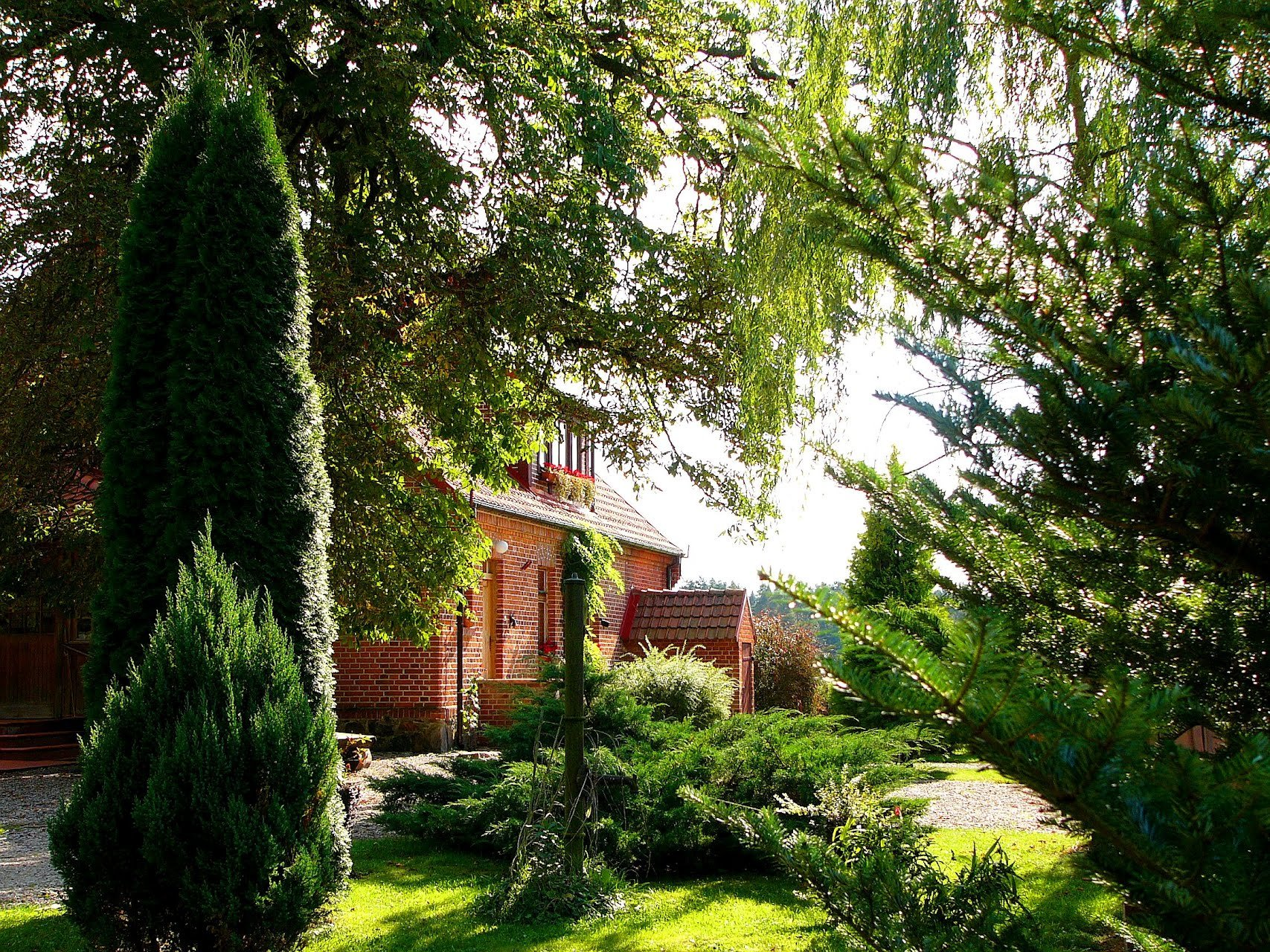 Forsthaus Kleinort. Geburts- und Kindheitsort des deutschen Schriftstellers Ernst Wiechert.